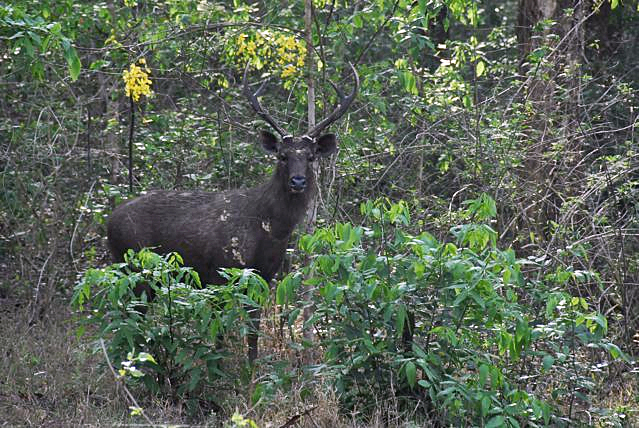 Sambar deer in forest